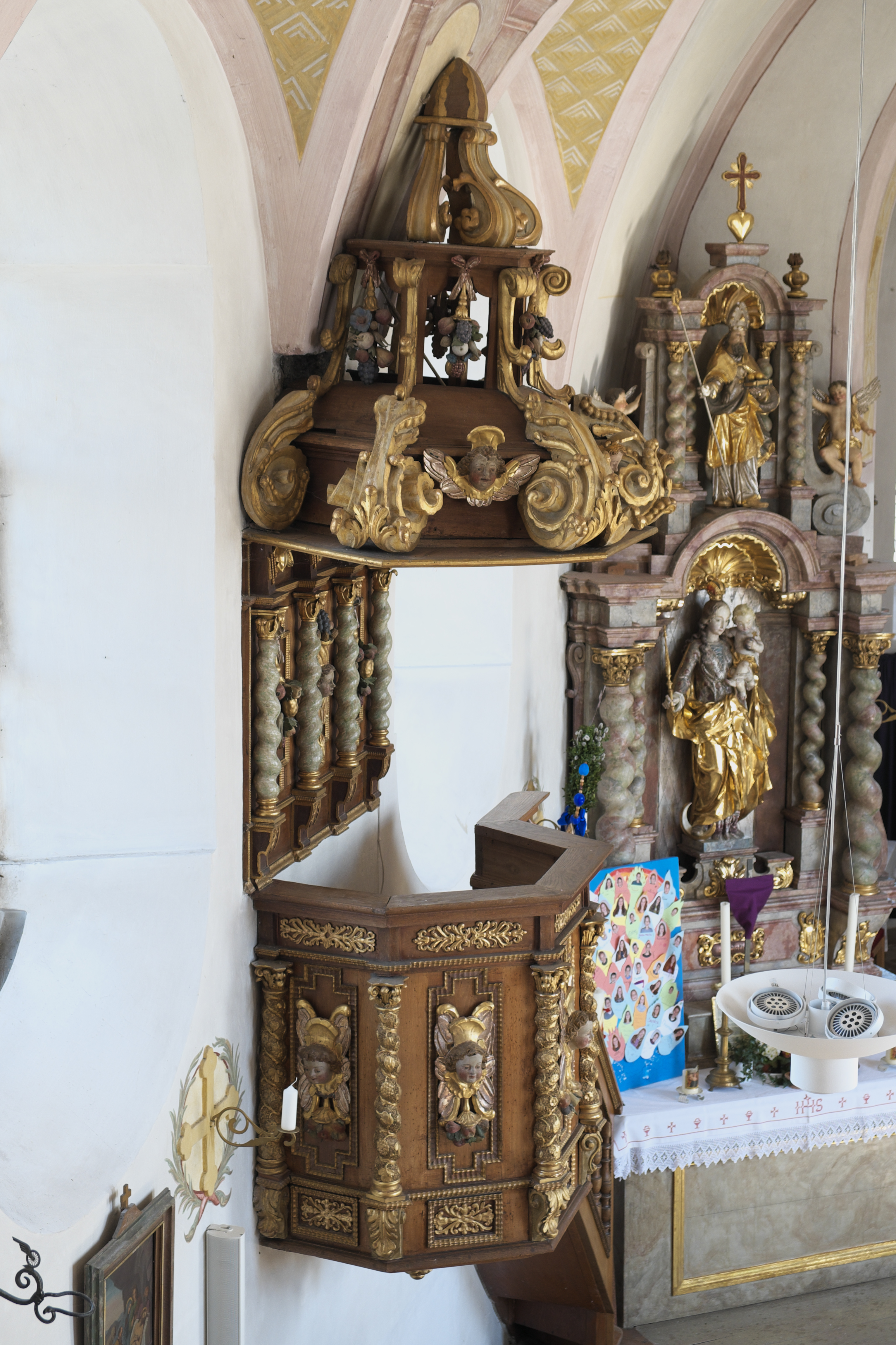 Katholische Pfarrkirche St. Mauritius in Oberhausen im Landkreis Weilheim-Schongau (Bayern/Deutschland), Kanzel